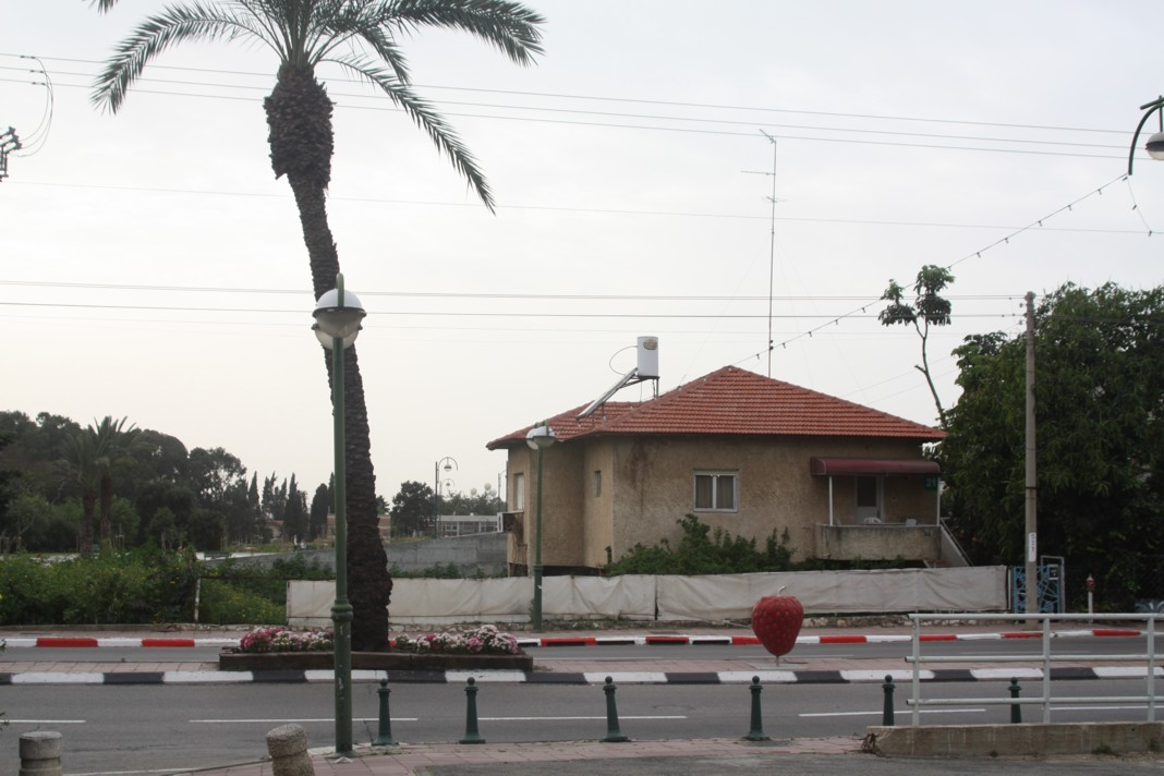 בית ברחוב סוקולוב ברמת השרון, מאחרוני הבתים הוותיקים שנותרו ברחוב